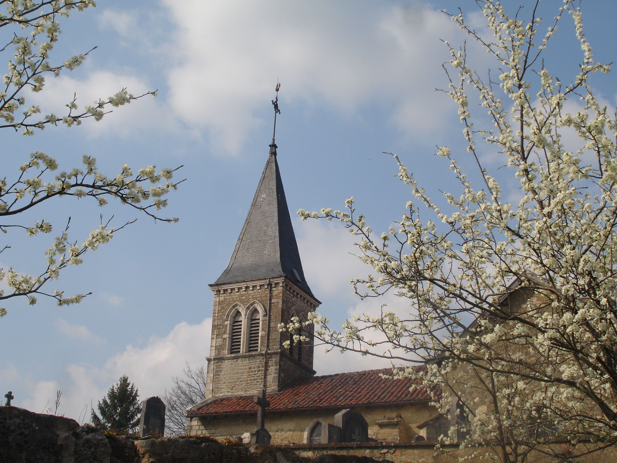 Pressiat (Ain) : Le clocher de l'église